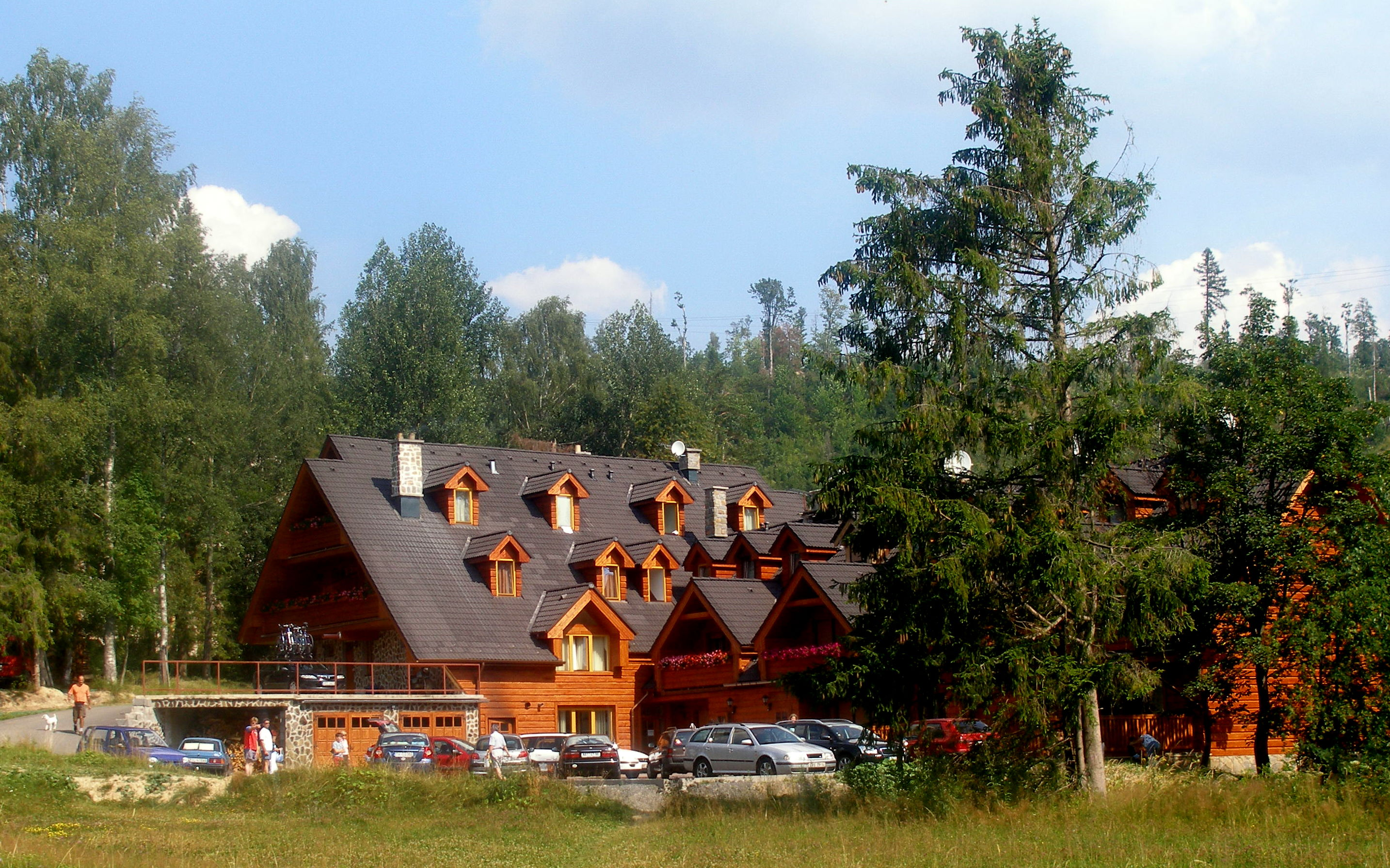 Osada Tatranská Lomnica, apartmánový komplex pri tenisovej hale, mesto Vysoké Tatry.